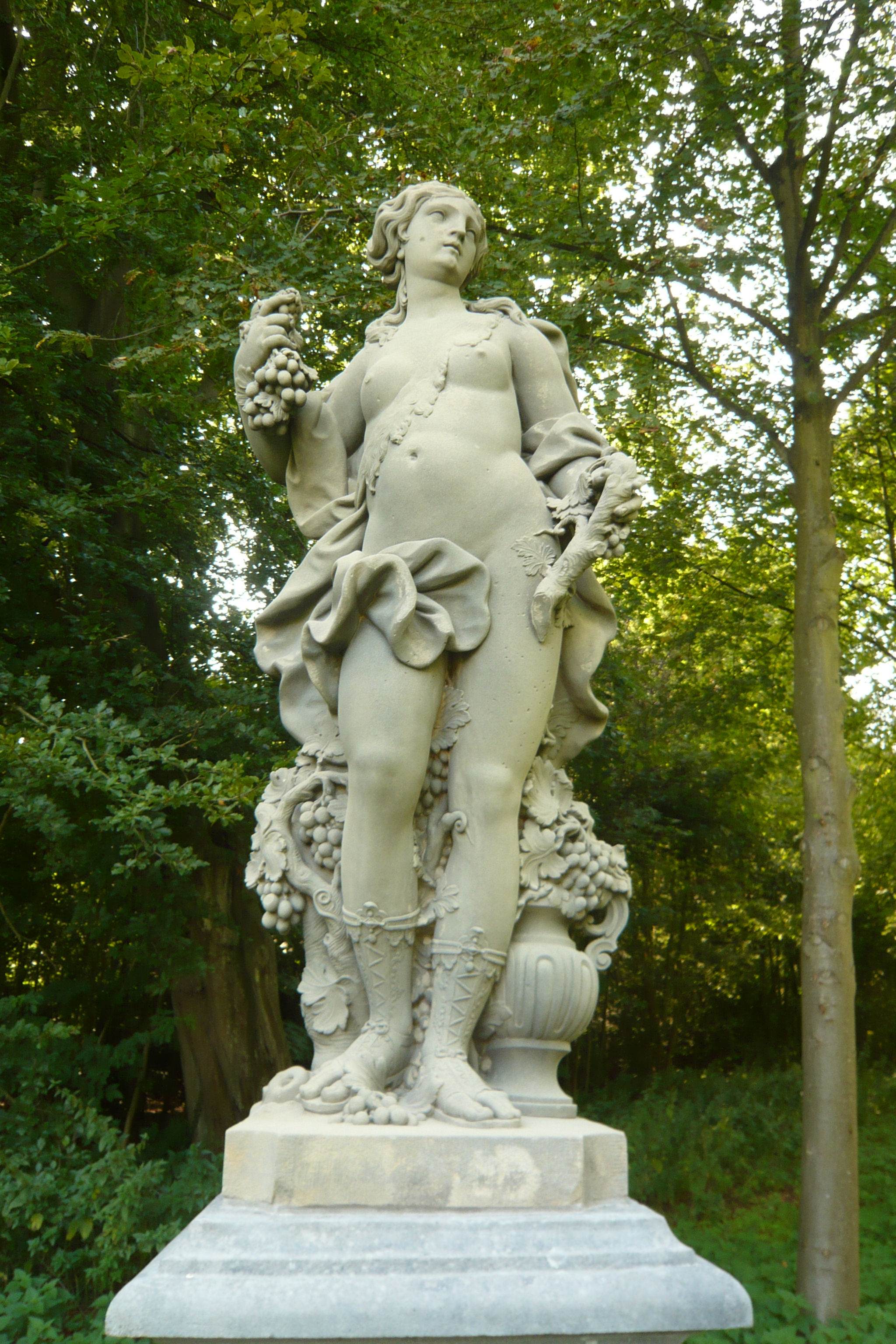 Ariadne door Jan van Logteren 1734 - Huis te Manpad